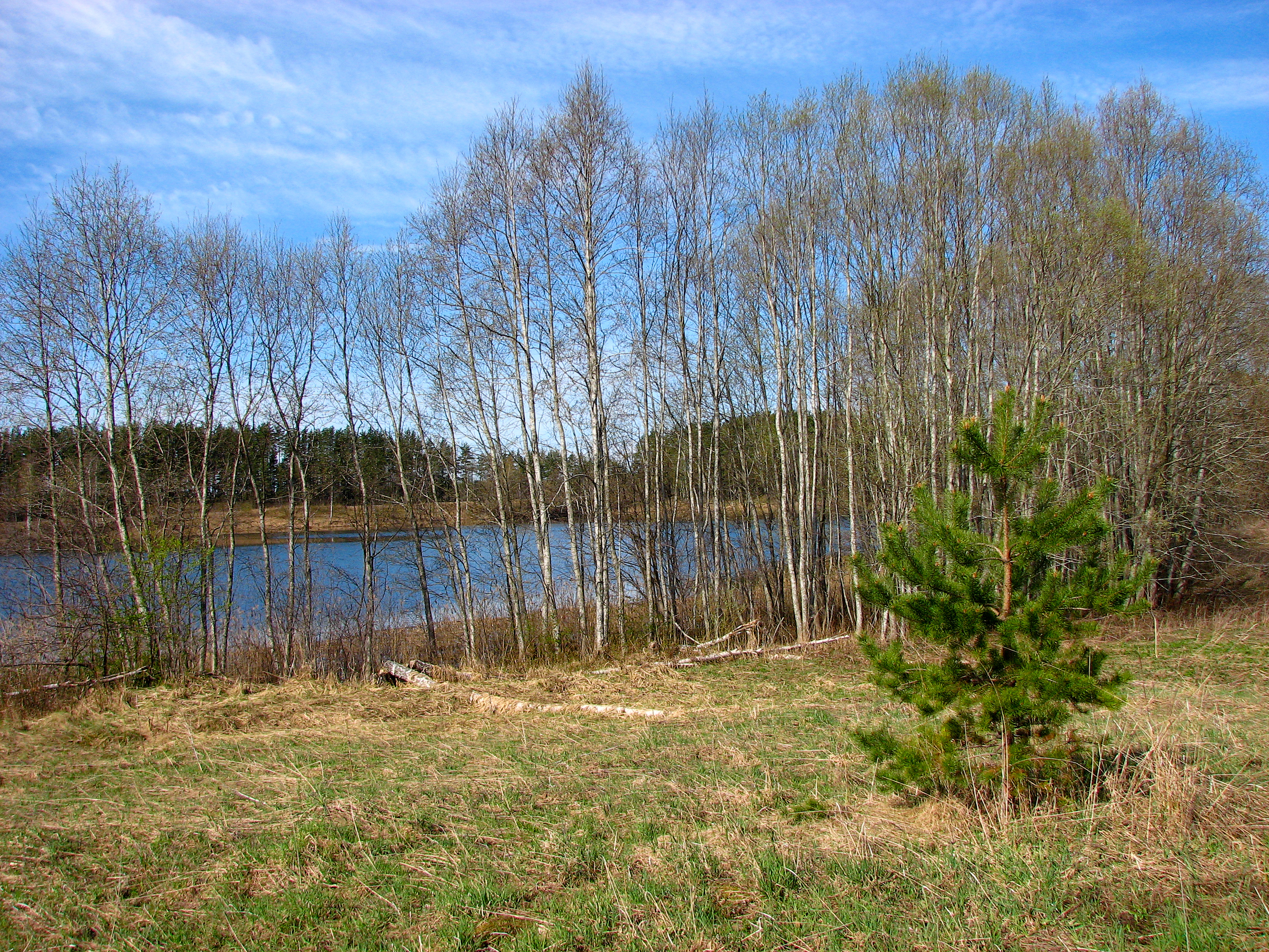 Šķeltova parish, Latvia